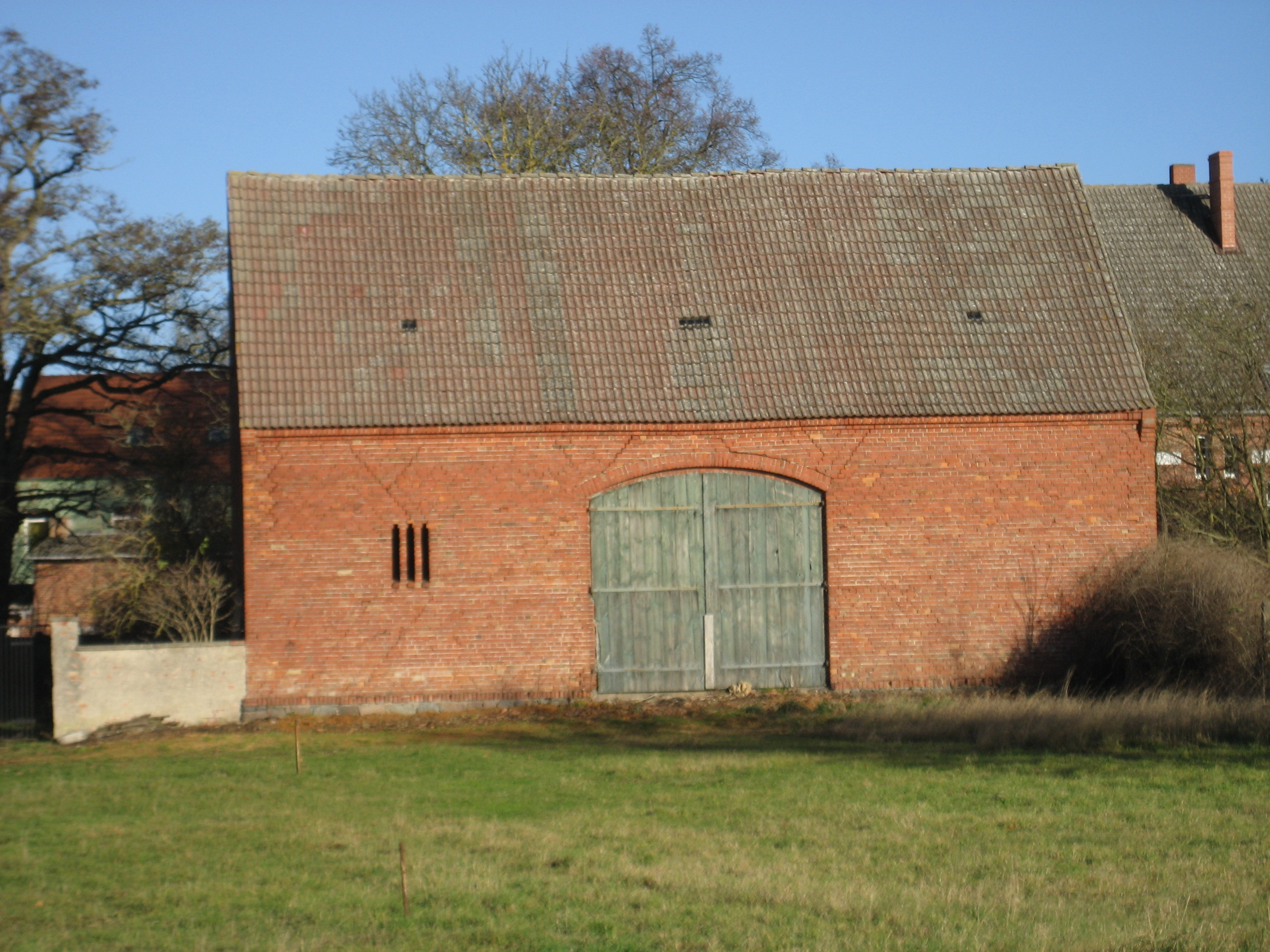 Pfarrscheune des Evangelischen Pfarramtes Löcknitz in der Chausseestraße 99.